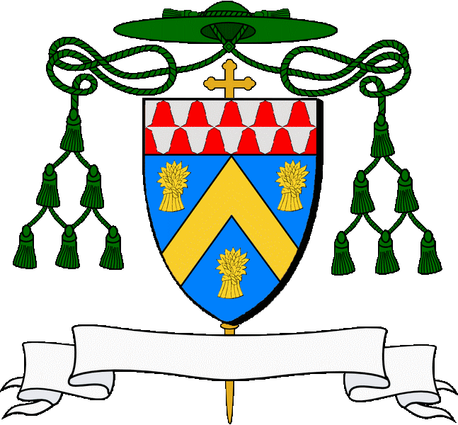 En glazur e gebrenn en aour heuliet gant tri manal ed ivez en aour; e gab brizhet etre arc'hant ha gwad a ziv rezenn